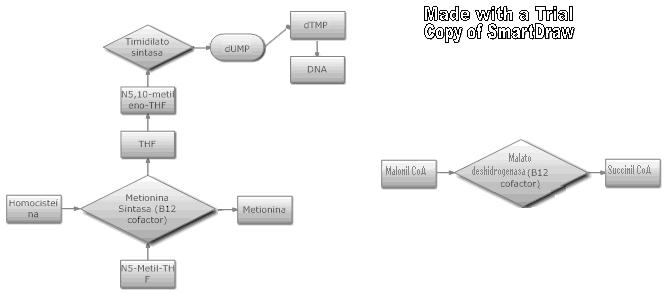 Esquema utilitat vitamina B12